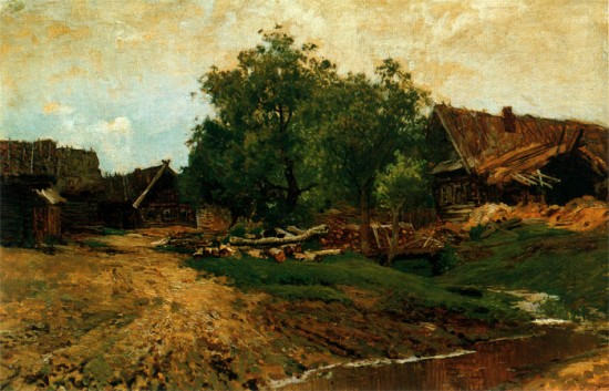 Саввинская слобода Savvinskaya Sloboda.